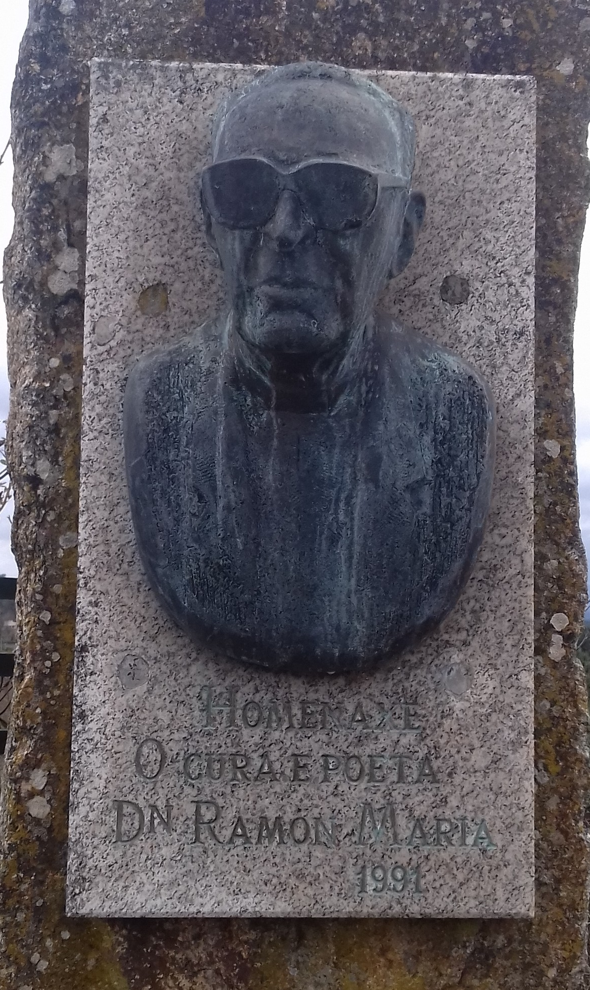 Escultura do poeta e cura Ramón María Blanco González en Soutopenedo, San Cibrao das Viñas. Obra de Xosé Cid Menor.